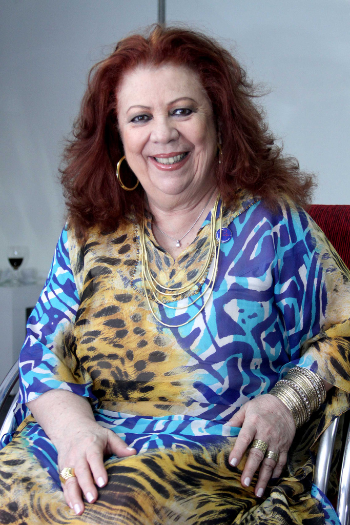 Cantora brasileira Beth Carvalho recebe do Ministério da Cultura a "Ordem do Mérito Cultural" (OMC), em cerimônia realizada em 09/11/2011 no Teatro de Santa Isabel, em Recife (PE).